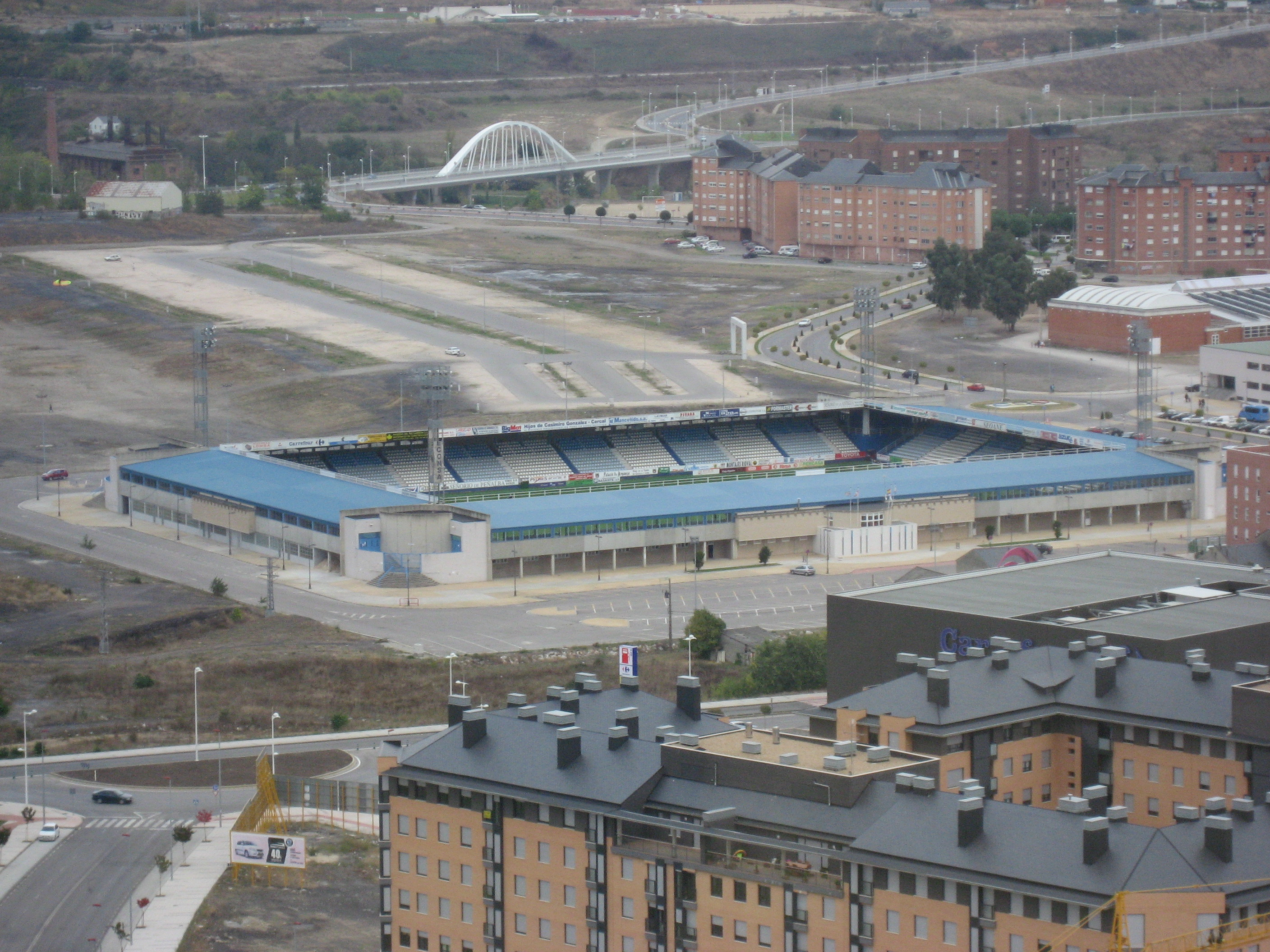 Vista aérea desde la torre de la rosaleda